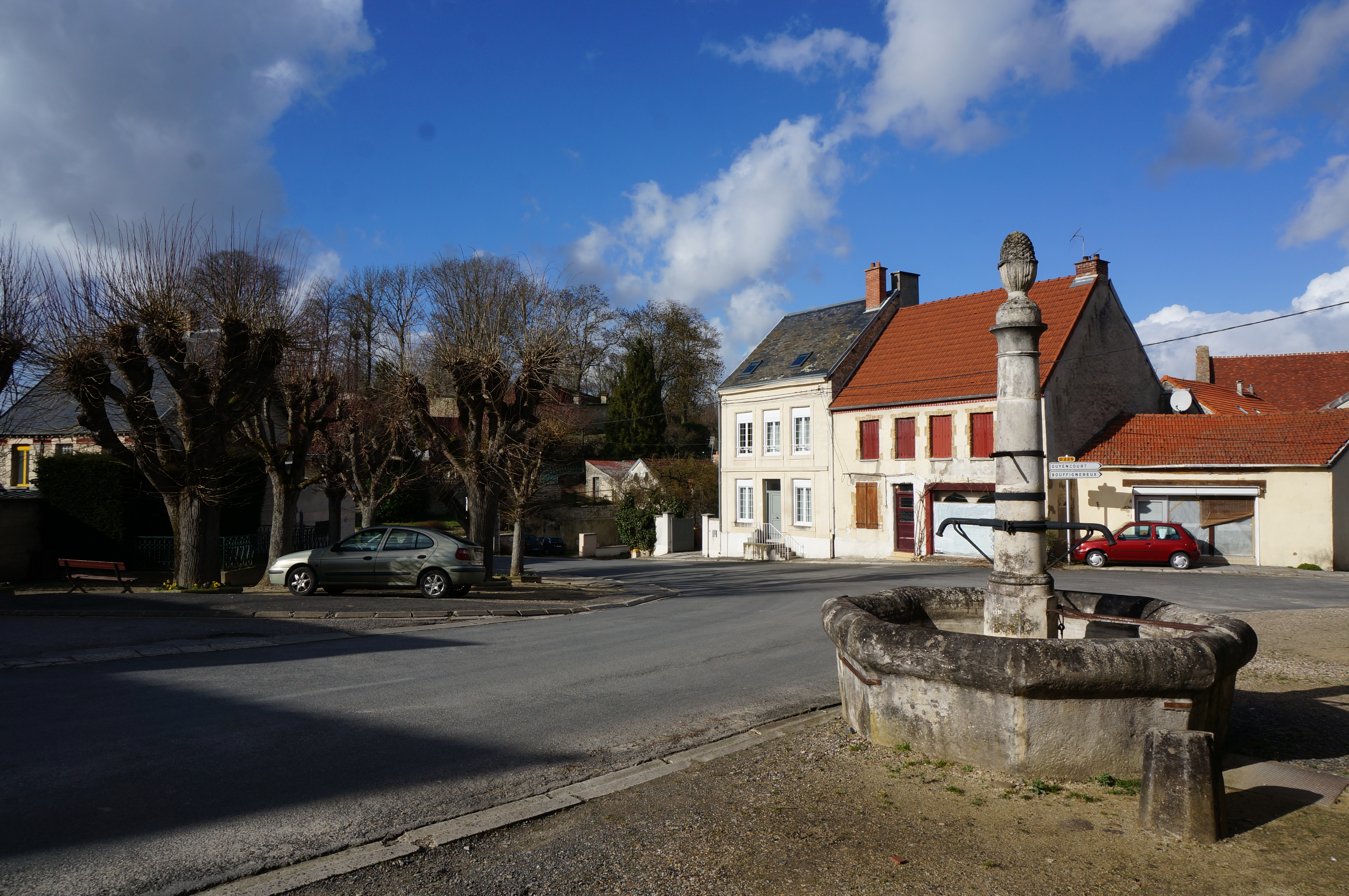 Le village de Roucy.